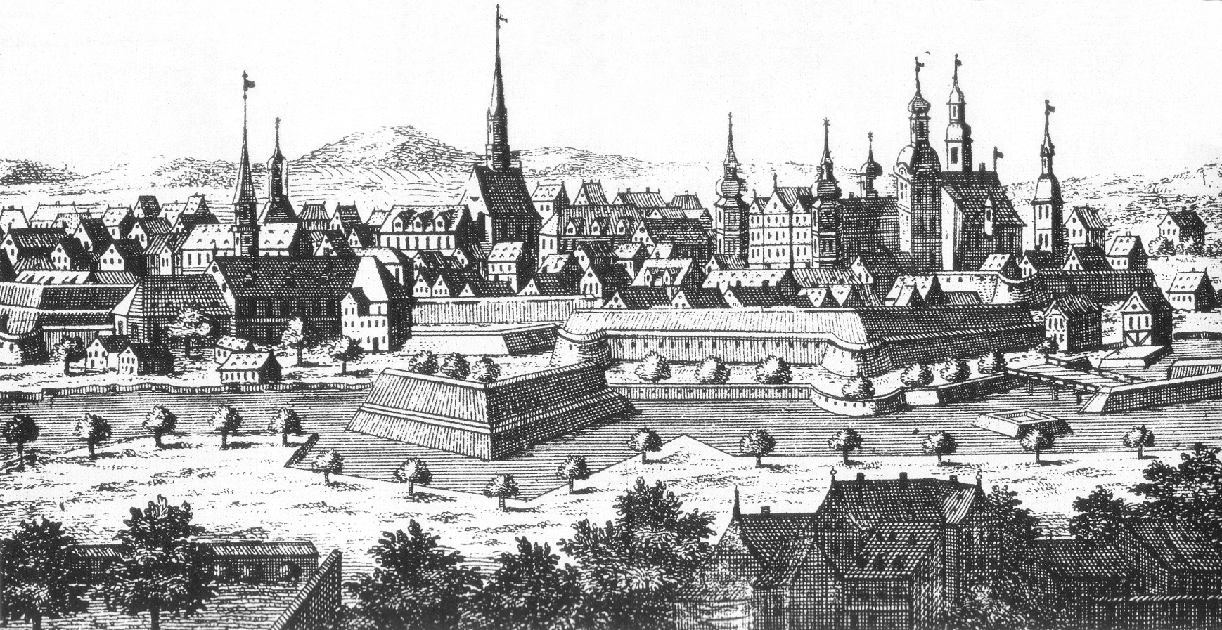 Blick auf Celle mit seiner Stadtbefestigung von Norden. die Türme sind überhöht dargestellt oder erfunden.